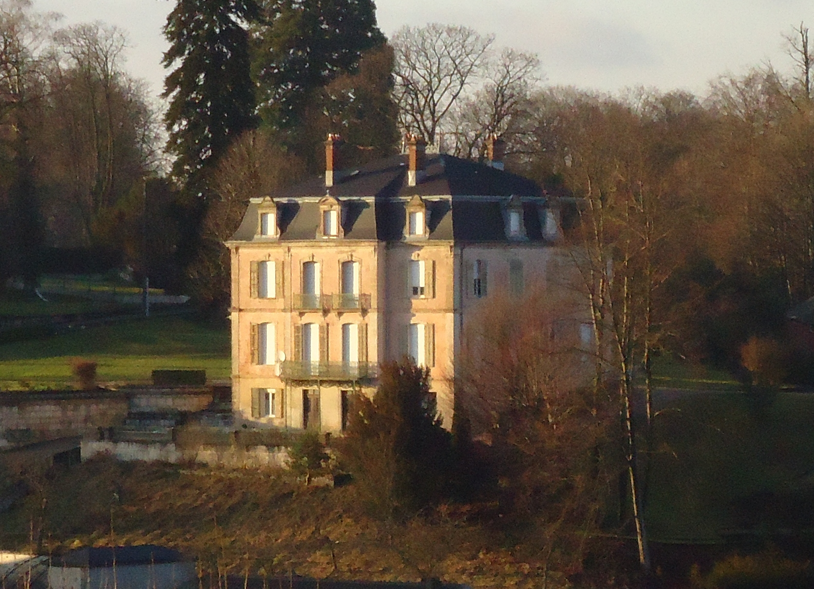 Chateau Albert Japy